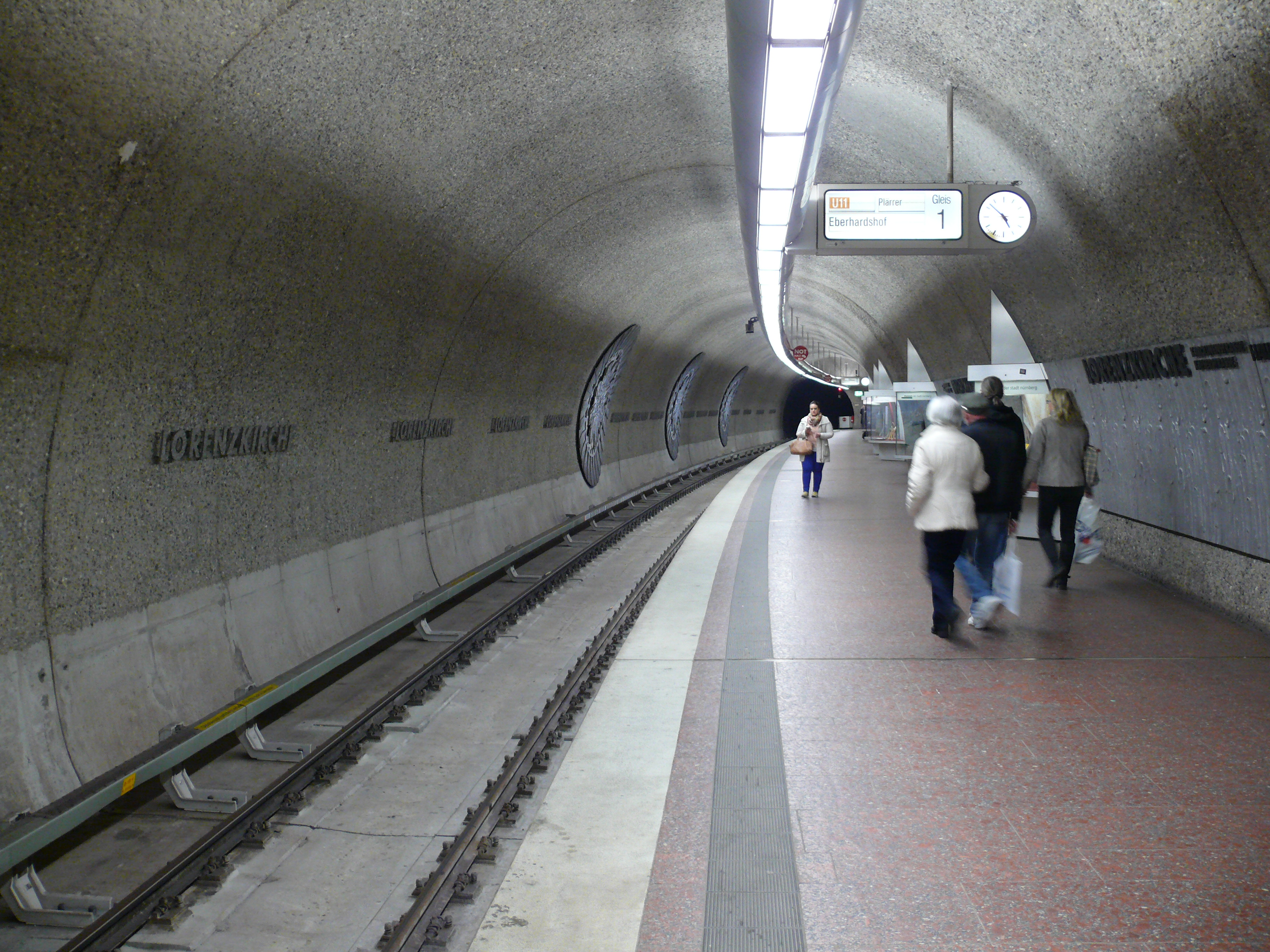 Gleis 1 am U-Bahnhof Lorenzkirche in Nürnberg.